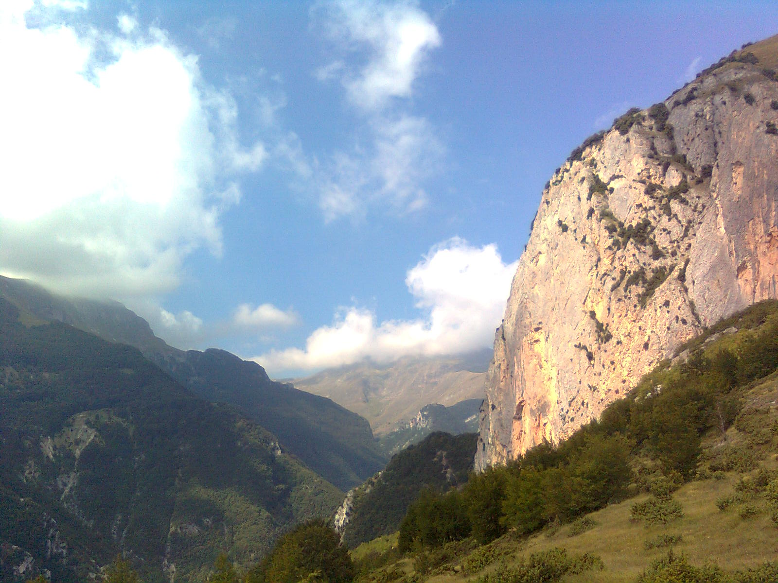 Balzo Rosso e la valle di Rinaldi (torrente Ambro), Monti Sibillini, Montefortino